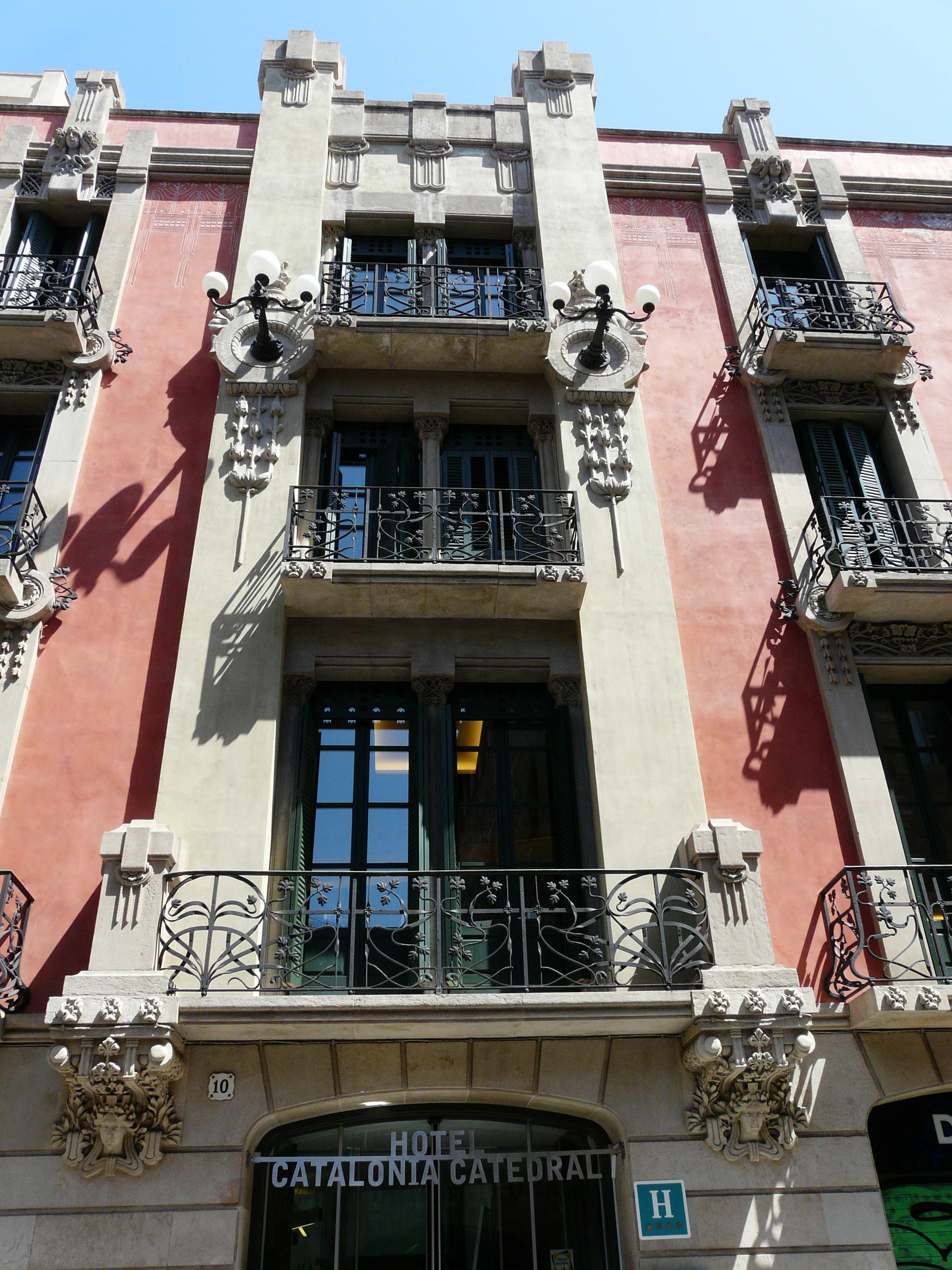 Edifici de l'antiga Hidroelèctrica de Catalunya (Barcelona)